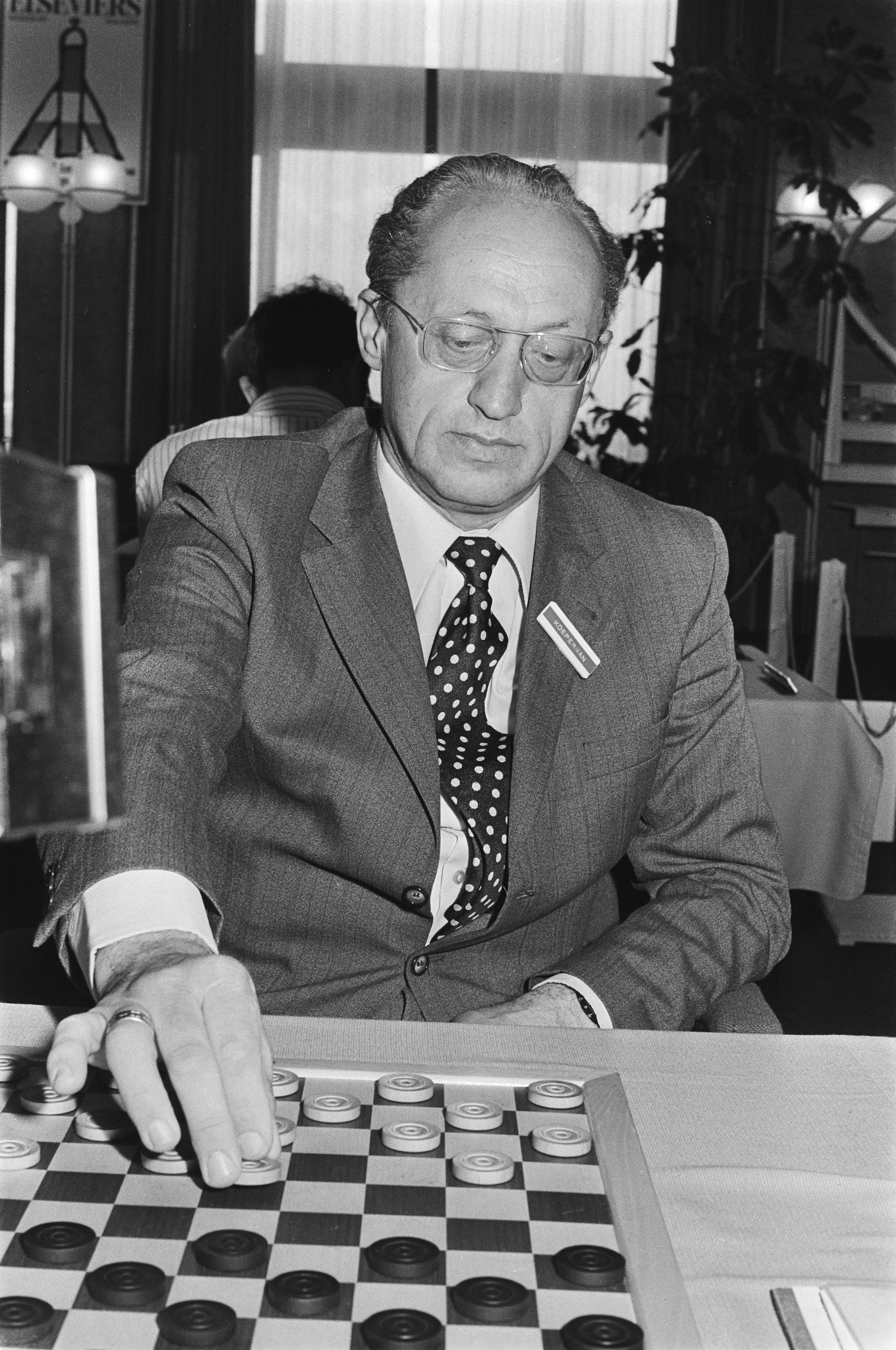 Wereldkampioenschappen Dammen in Amsterdam, Iser Koeperman